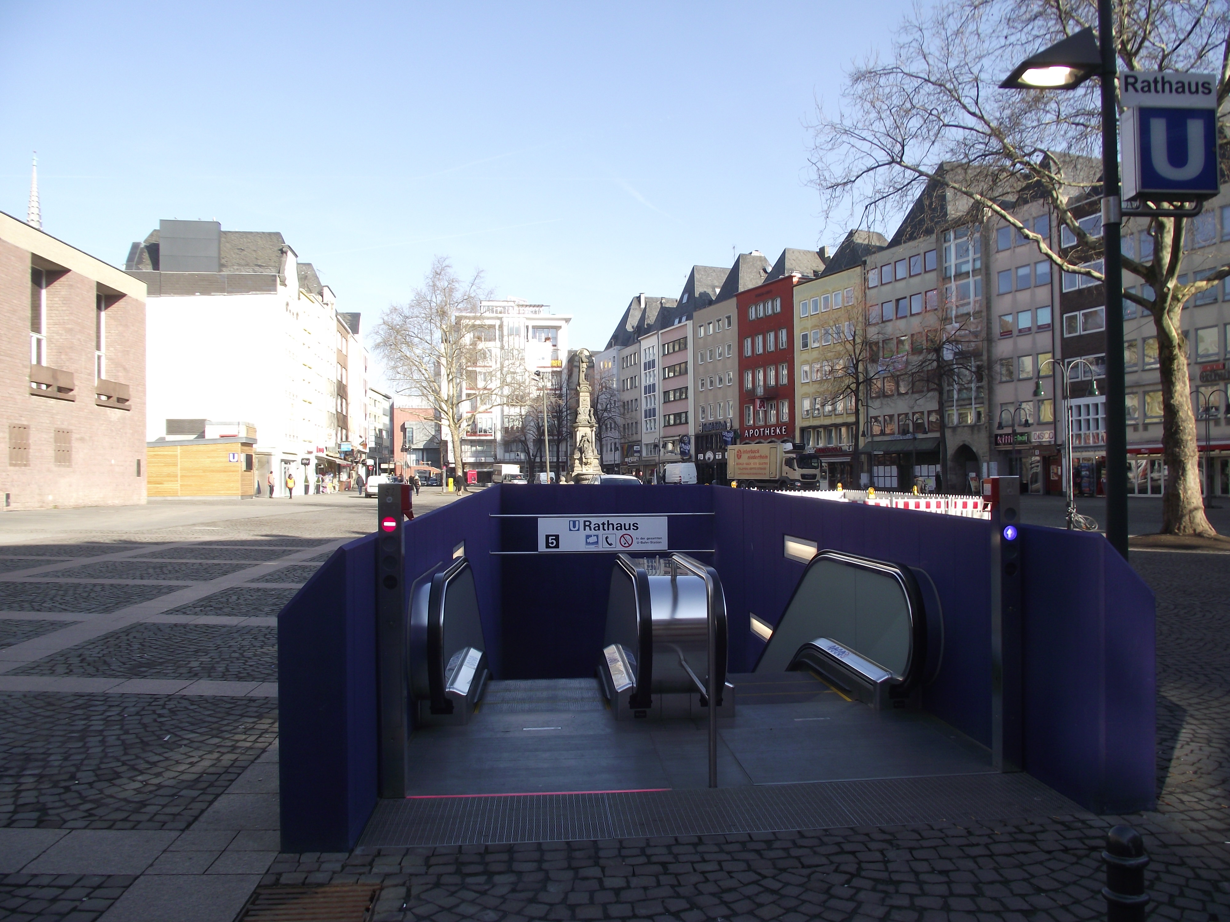 Ingang van Rathaus S-bahn station bij Alter markt plein.